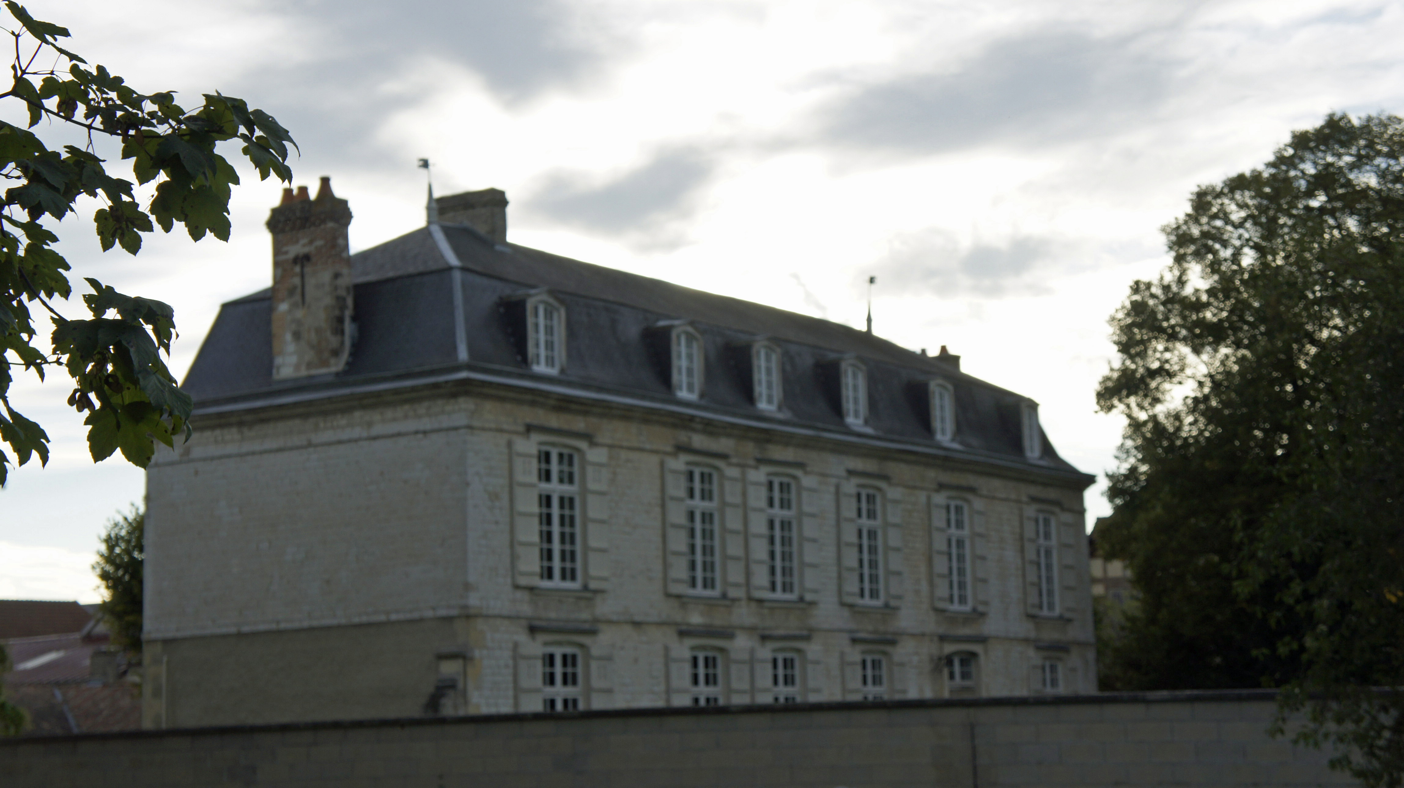 Arrière de la Maison aux Champs de Cormontreuil